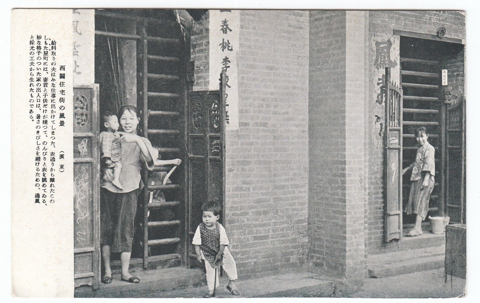 广州西关住宅街风景